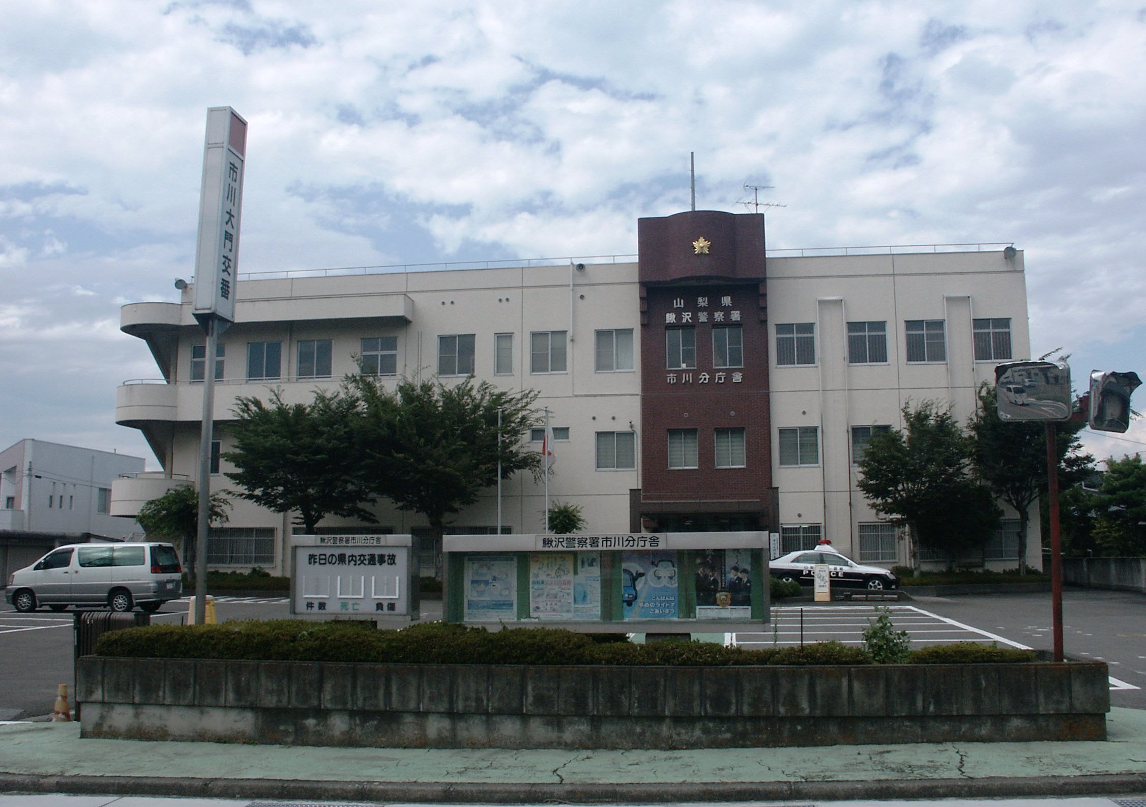 鰍沢警察署市川分庁舎・市川大門交番（旧市川警察署）